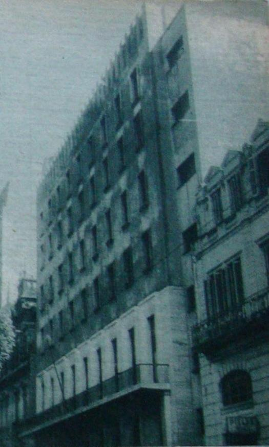 Fachada del actual edificio del Teatro Coliseo de la ciudad de Buenos Aires, Argentina. Sede hasta 2007 del Consulado General de Italia.